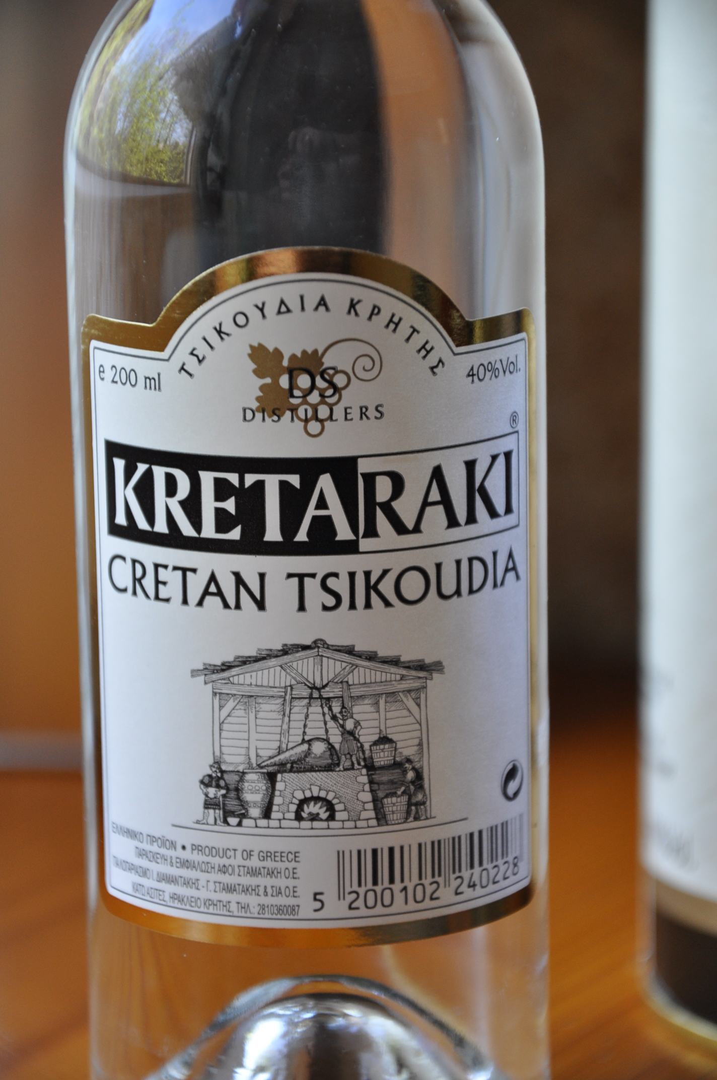 Raki z Krety. 200ml. alk.40%